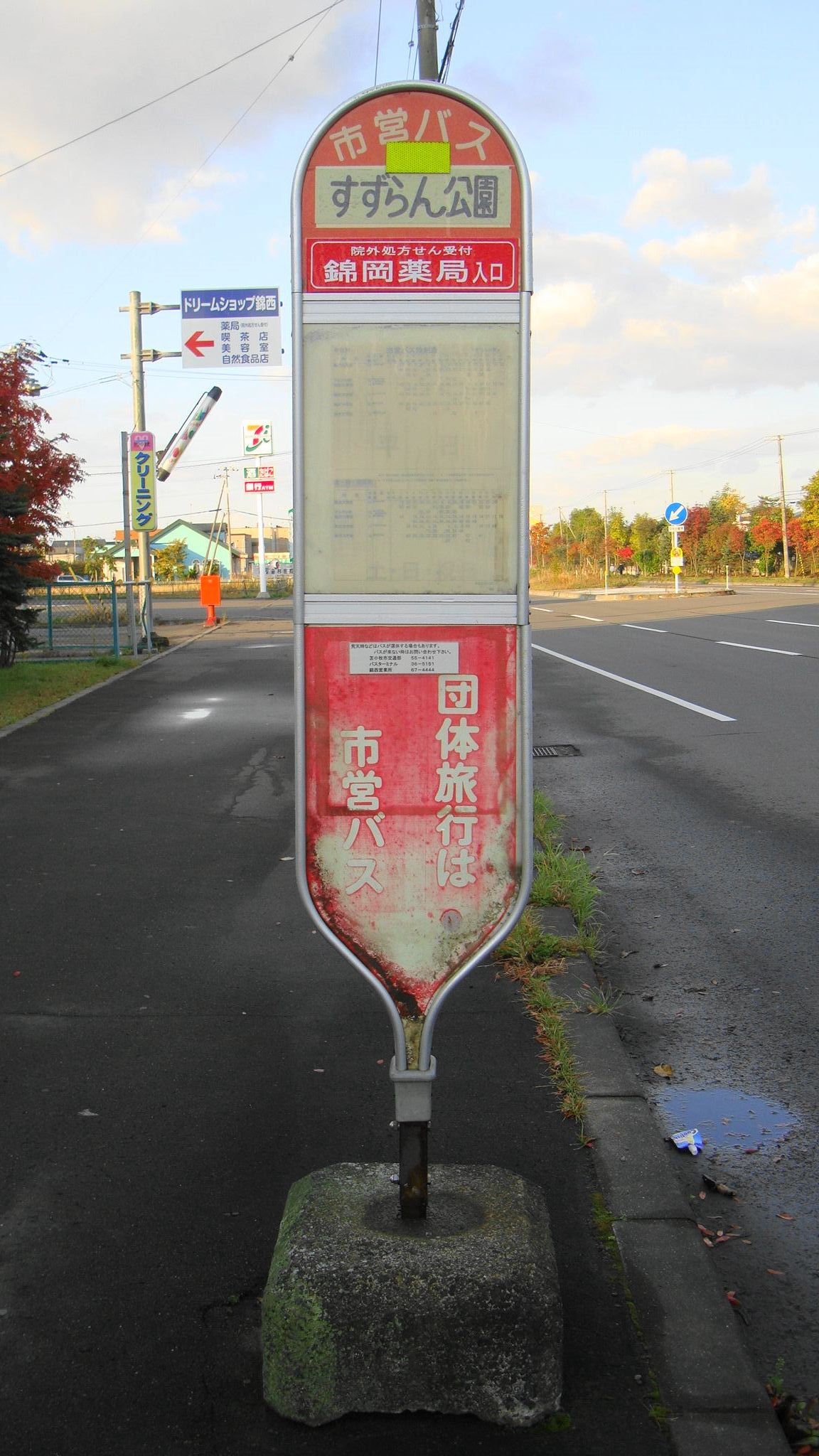 "Suzuran Kōen" bus stop